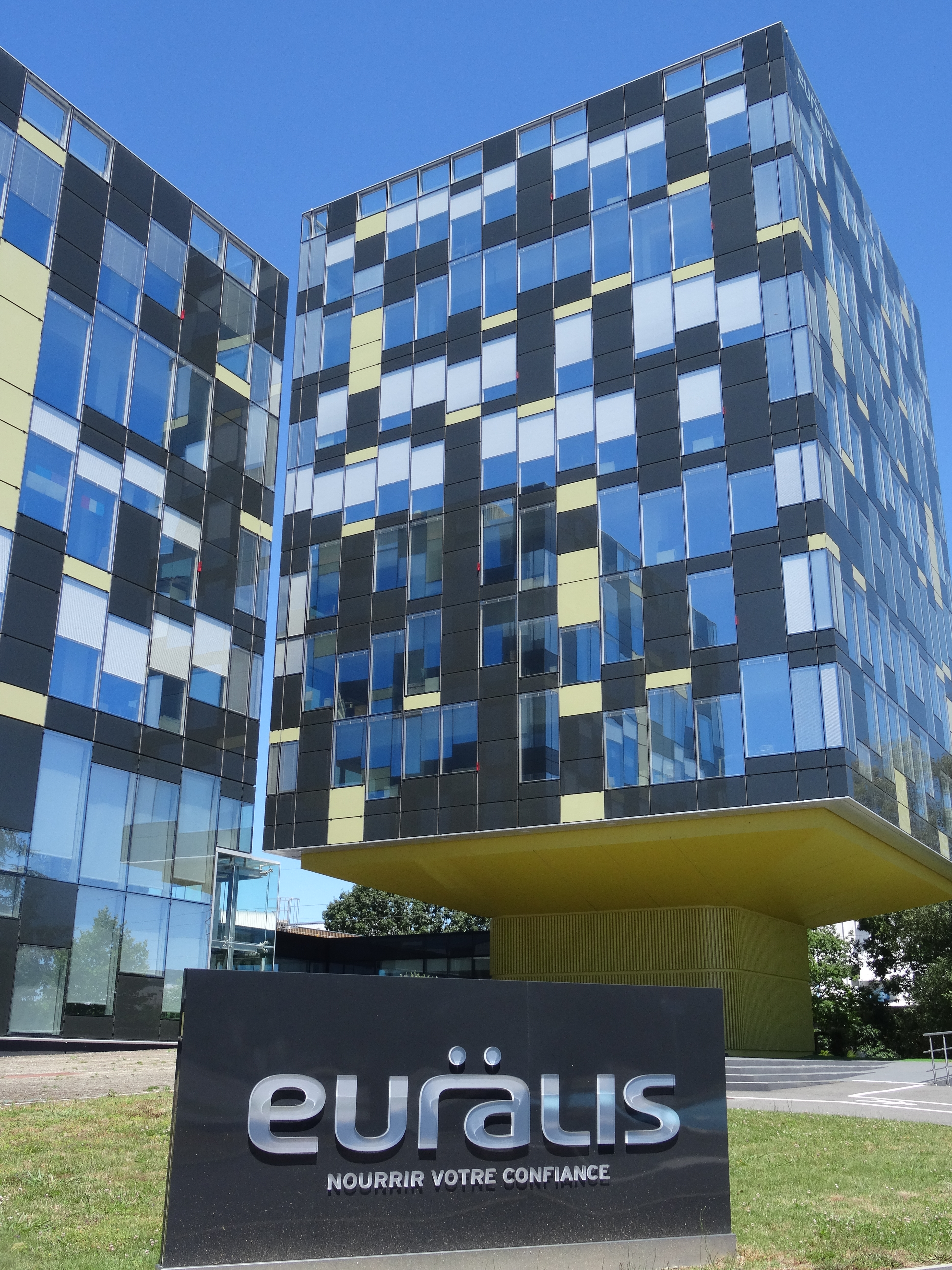 Siège du groupe Euralis à Lescar